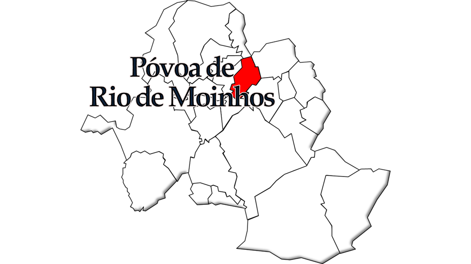 População